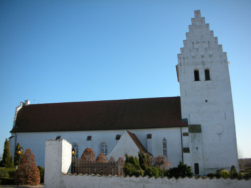 Fanefjord Church, Moen, Denmark